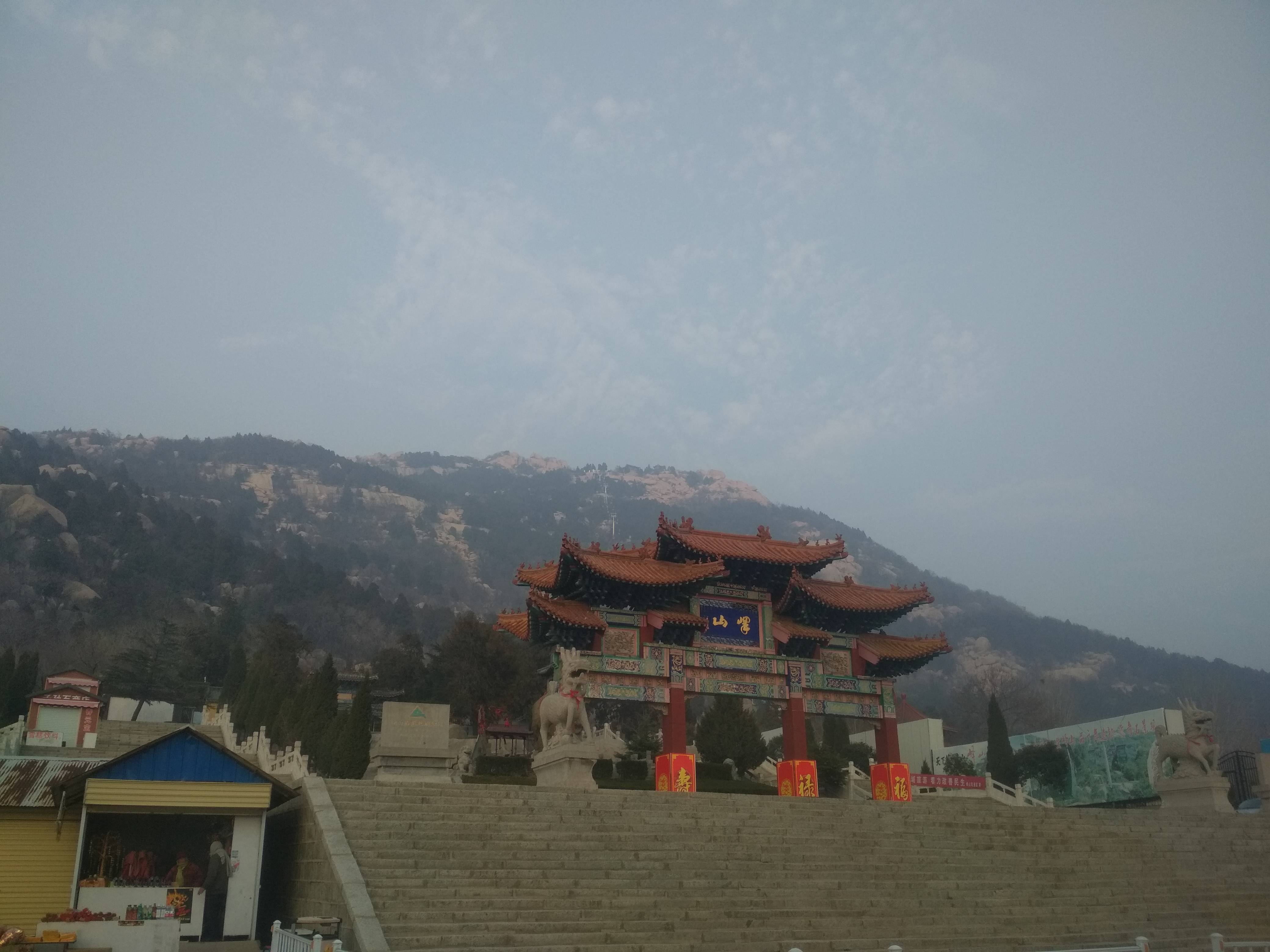 中文（中国大陆）: 中国山东省邹城市峄山风景区